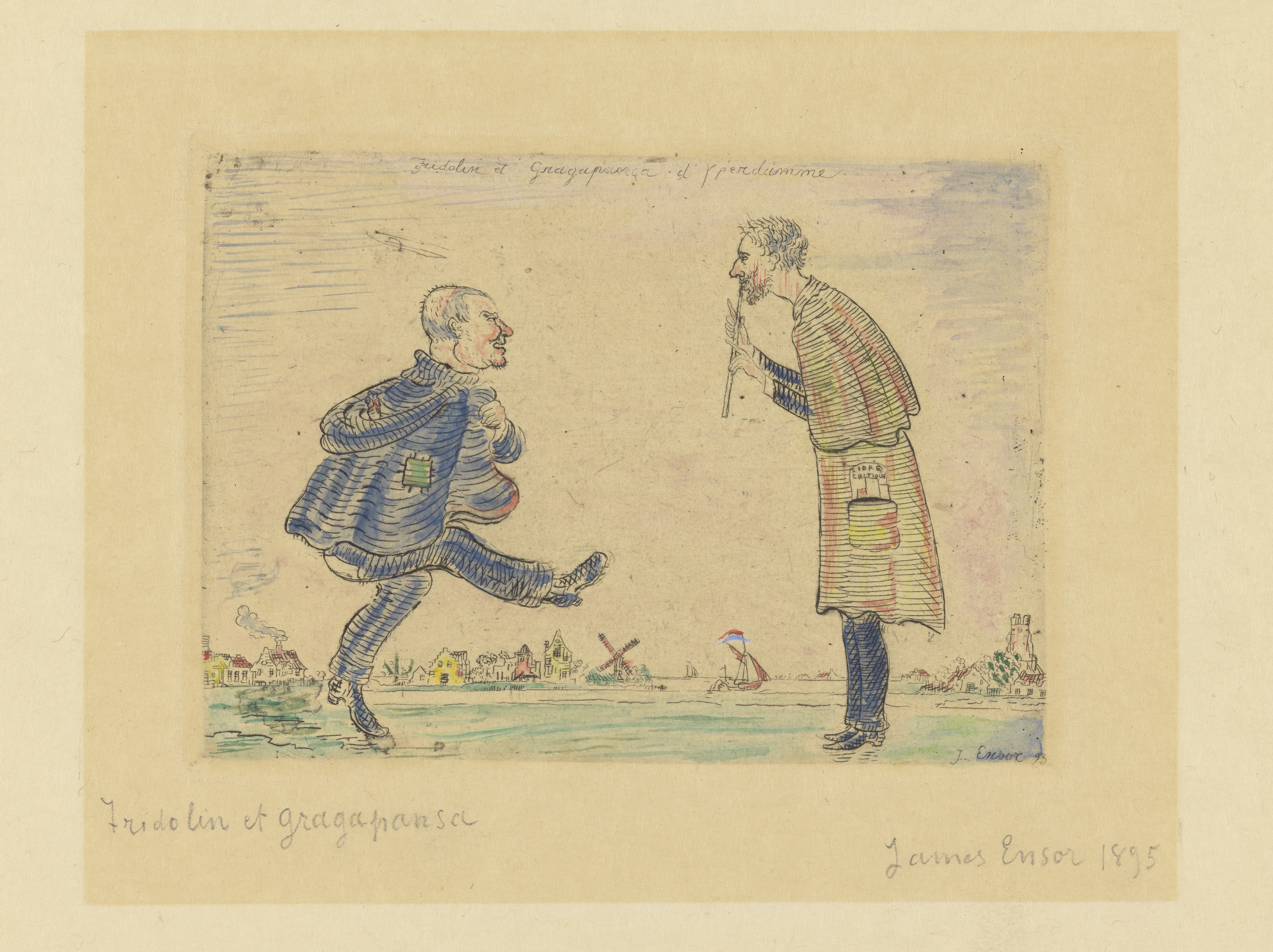 Fridolin et Gragapanca d'Yperdamme (James Ensor, 1895); collection: Groeningemuseum; alias pour James Ensor et Eugène Demolder (livre: La Légende d'Yperdamme,)